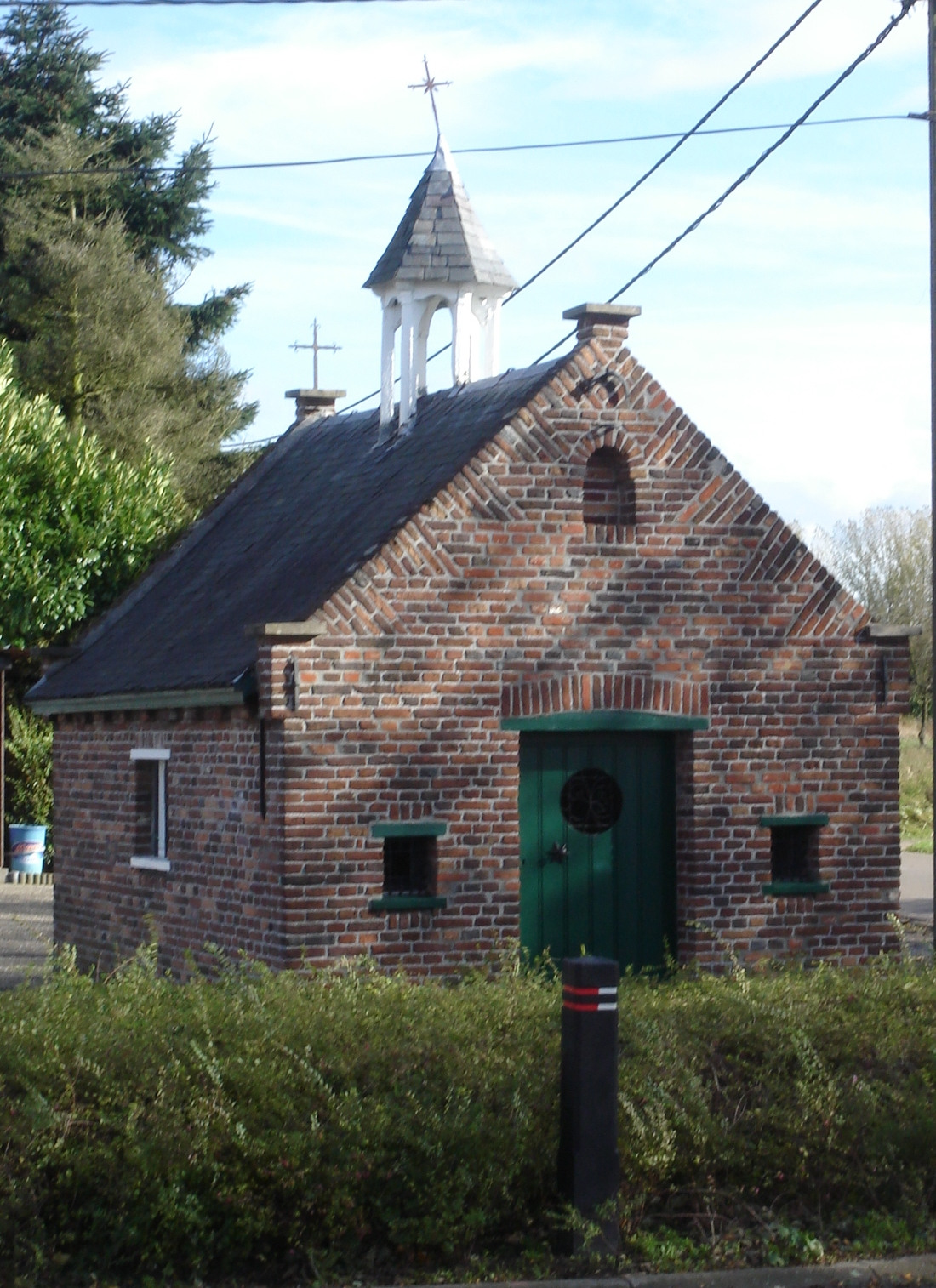 Kapel van Kievermont of kapel van Roten toegewijd aan Onze-Lieve-Vrouw van Zeven Weeën. Gelegen op de hoek van Kievermont en Voort, Geel, BE.